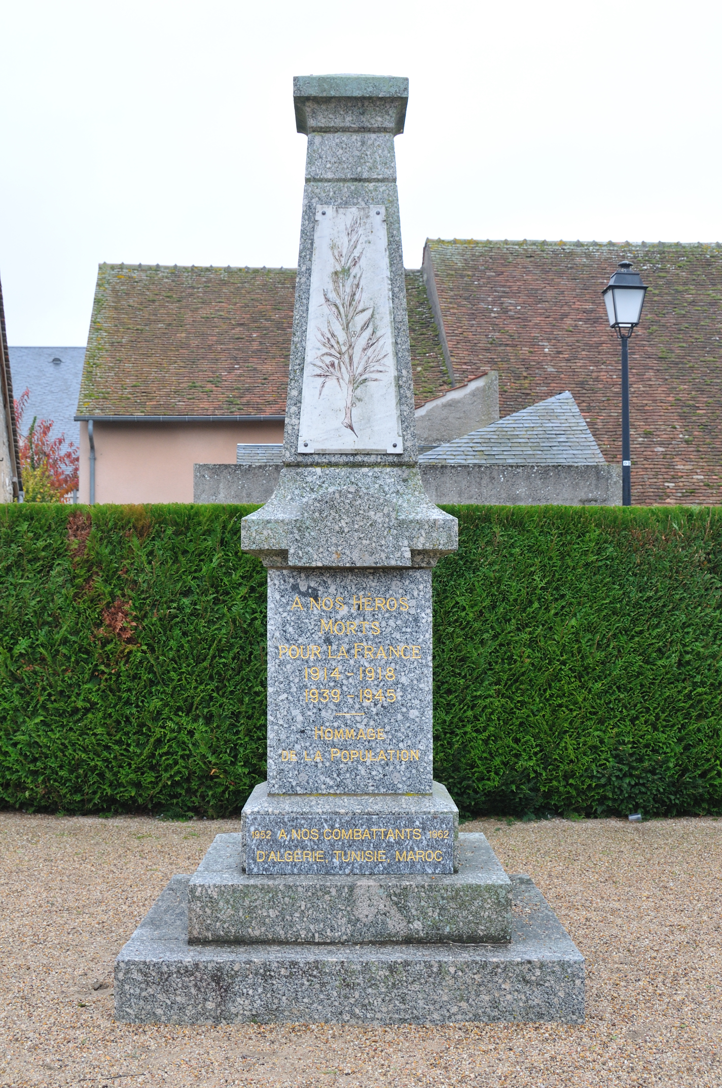 Monument aux morts, Fay-aux-Loges, Loiret, France